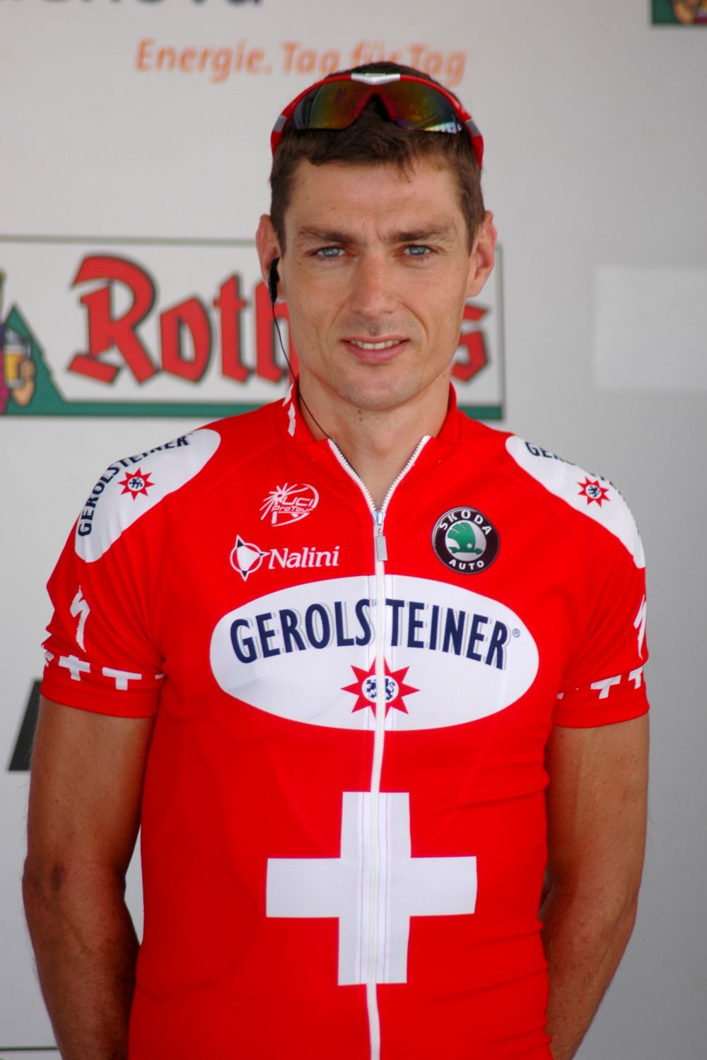 Beschreibung: Der amtierende Schweizer Meister Beat Zberg vor dem Start der zweiten Etappe der Rothaus Regio-Tour 2007 in Müllheim (Baden). Quelle: selbst fotografiert Datum: 23. August 2007 Ort: Neuenburg am Rhein, Baden-Württemberg, Deutschland Fotograf oder Zeichner: Alex Alex (de) Kamera: Nikon D 70 Software: The GIMP Andere Versionen: Lizenzstatus: GNU FDL